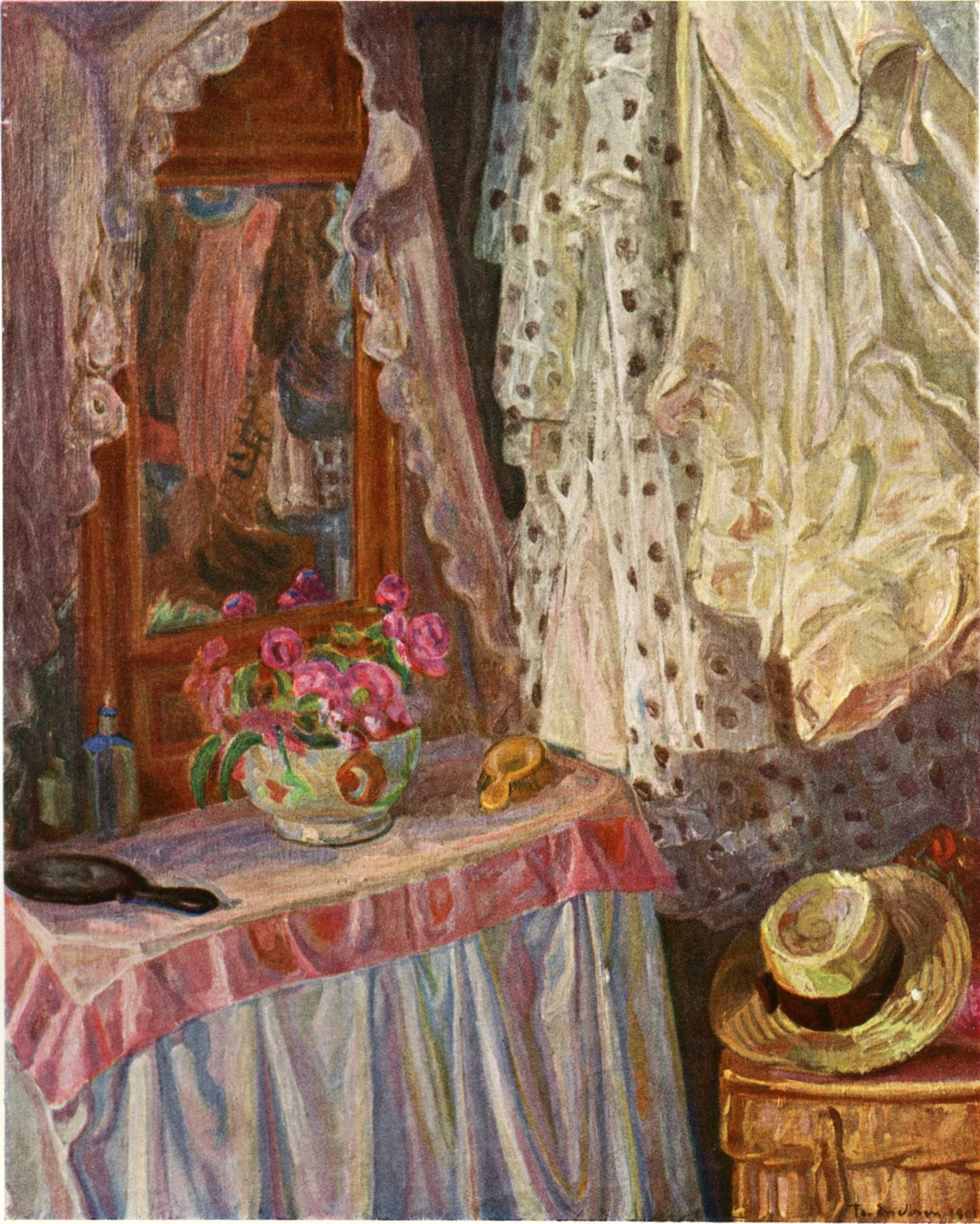 Norwegian: En ung pikes værelselabel QS:Lno,"En ung pikes værelse"